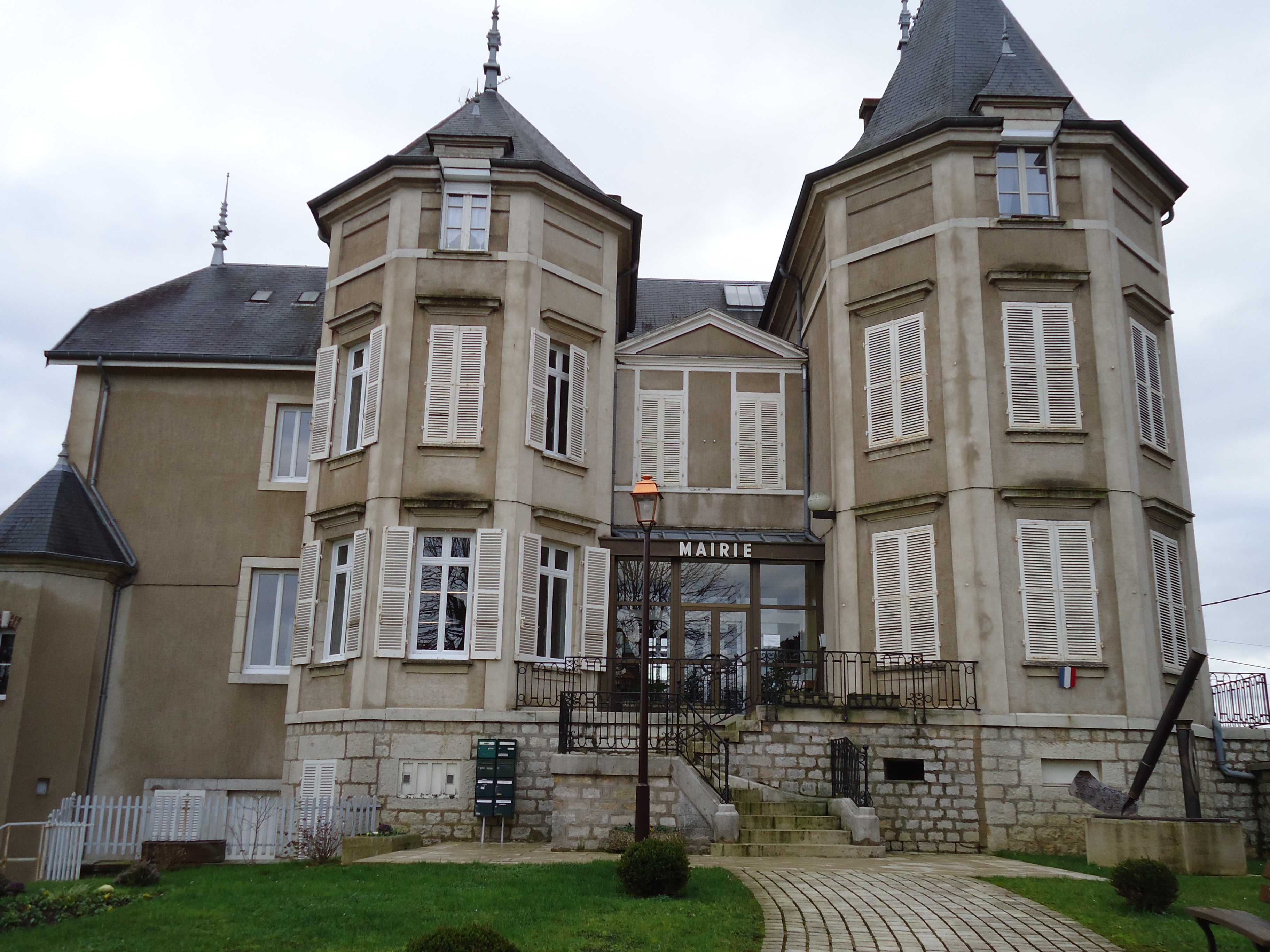 Mairie de Foucherans (39)